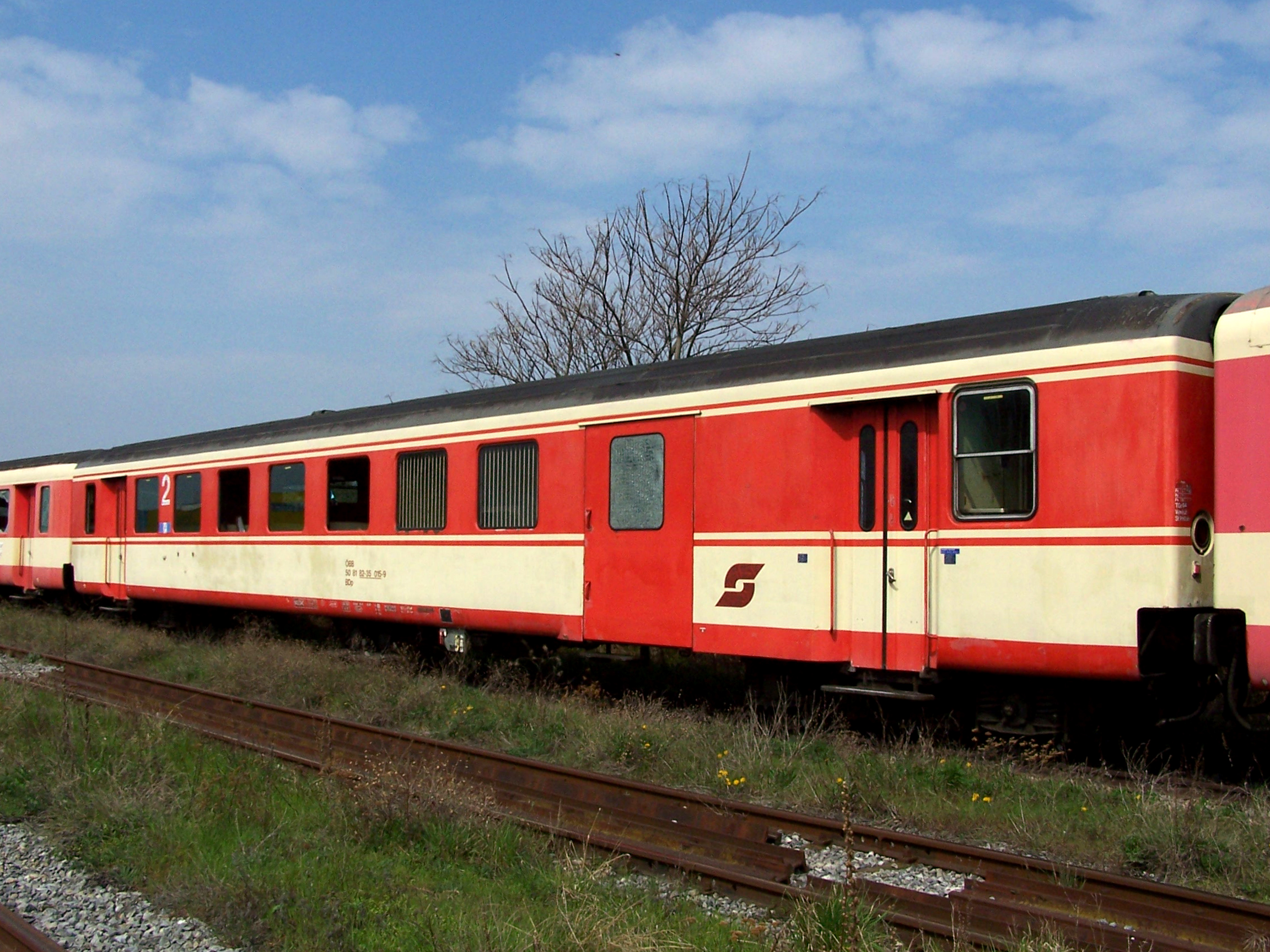 Halbgepäckwagen BDp 82-35 015-9 am Vbf. Breitenlee